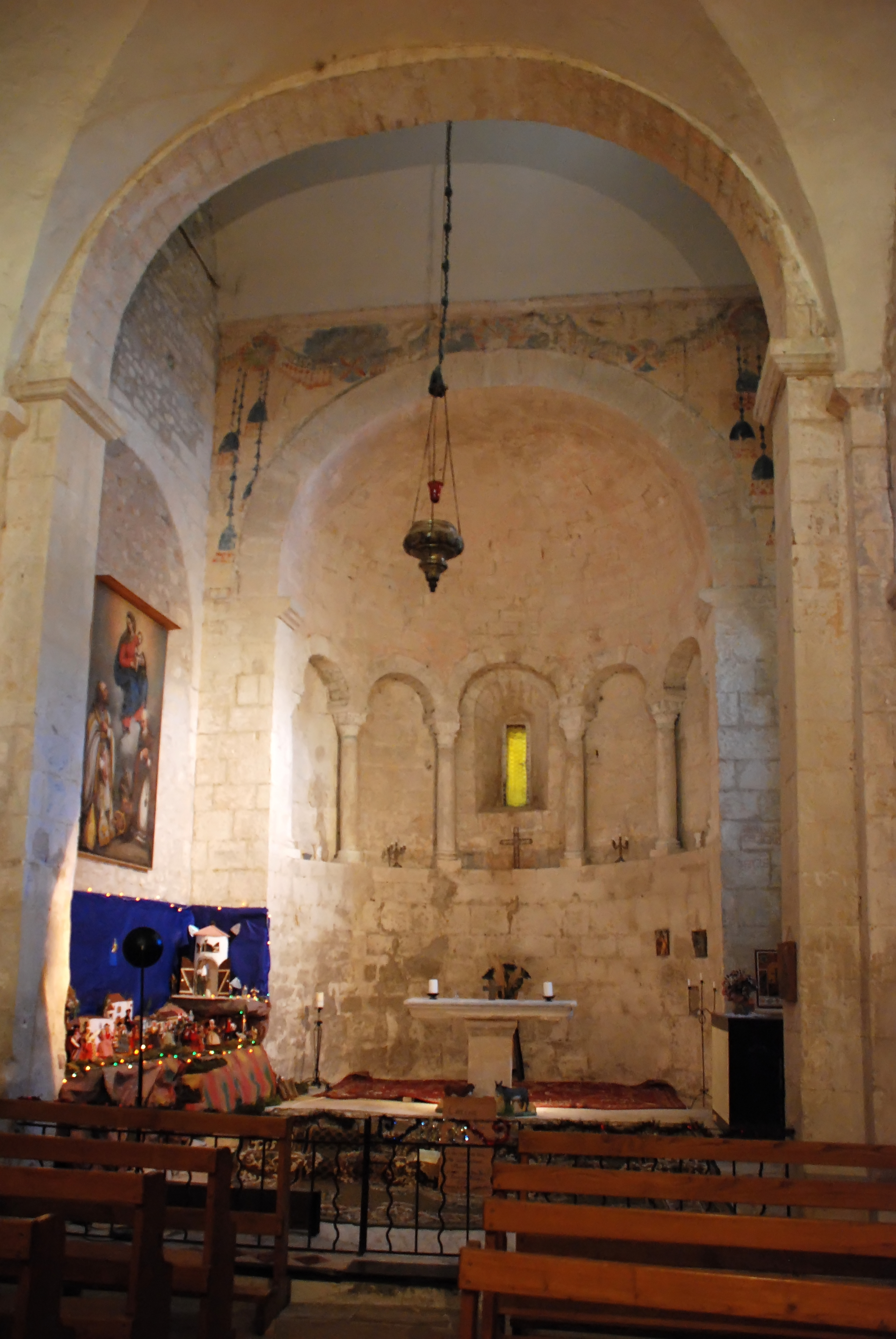 France - Provence - Alpes-de-Haute-Provence - Église de Saint-Martin-les-Eaux